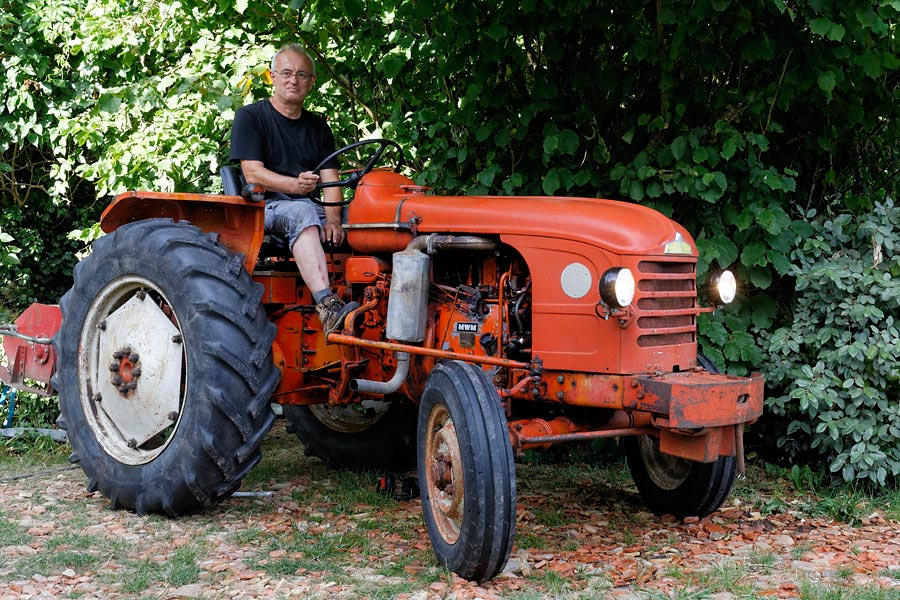 Tracteur Renault D22 1959